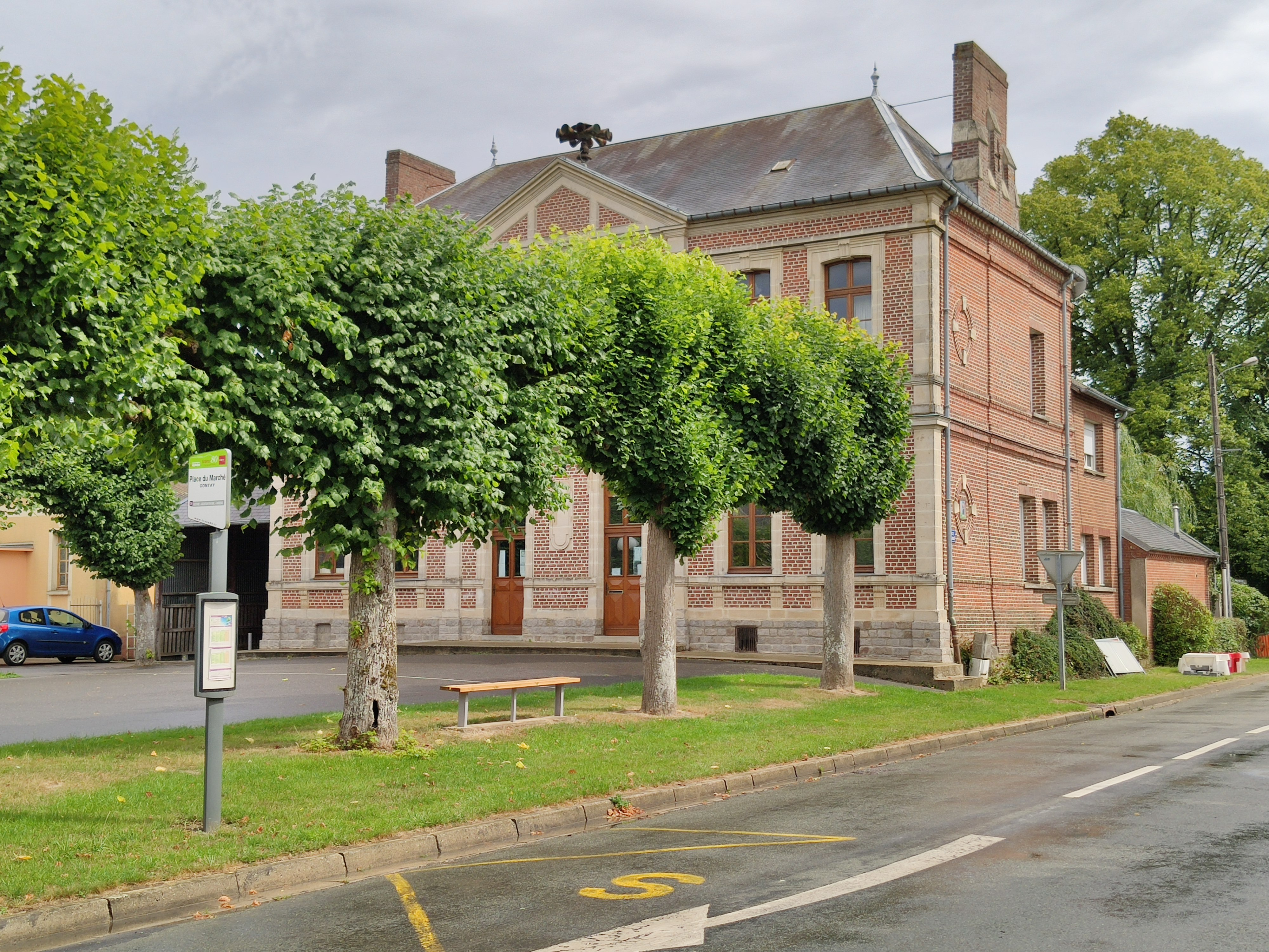 Contay : Mairie et arrêt d'autocar "Place du marché"